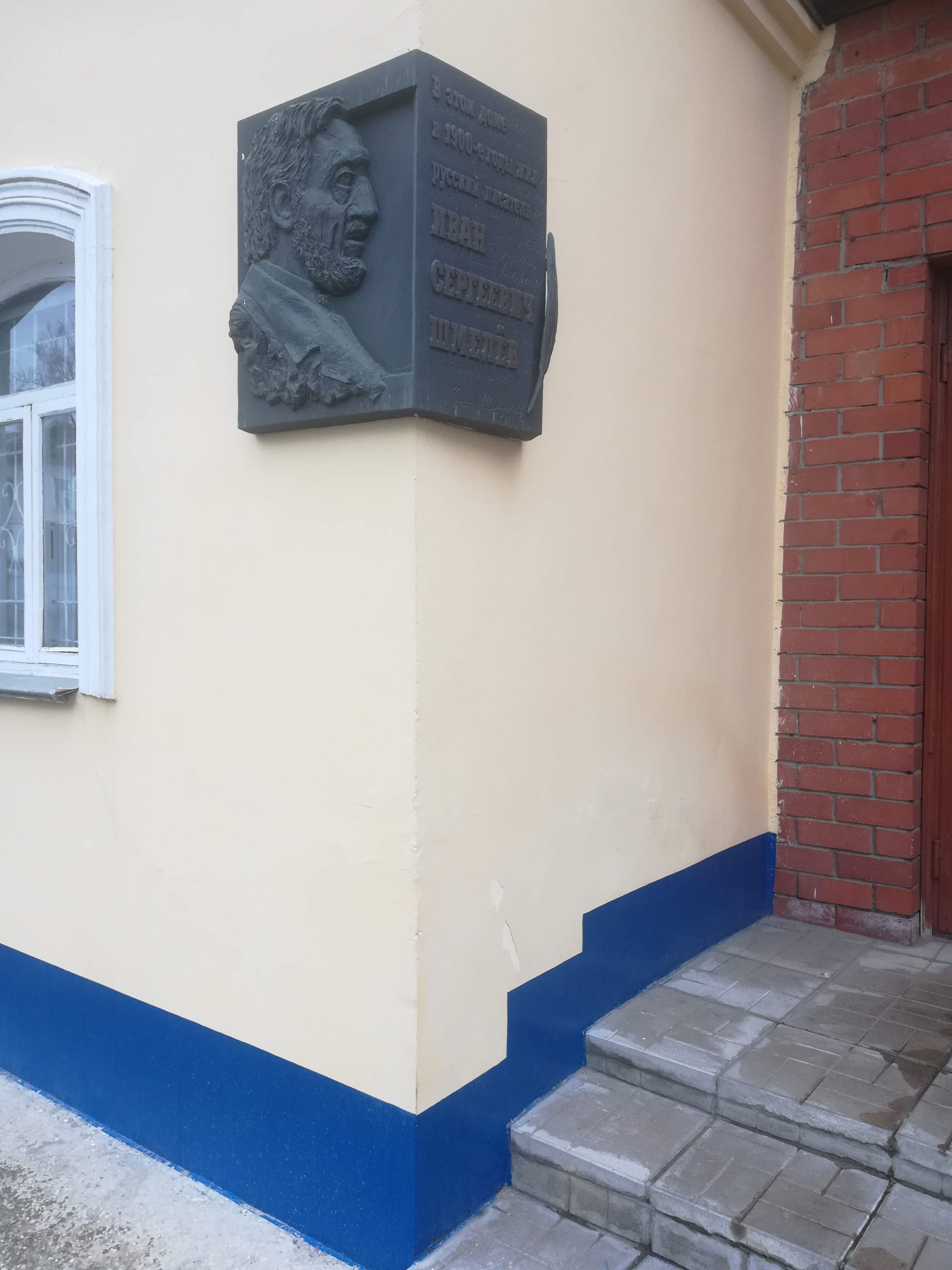 Владимир